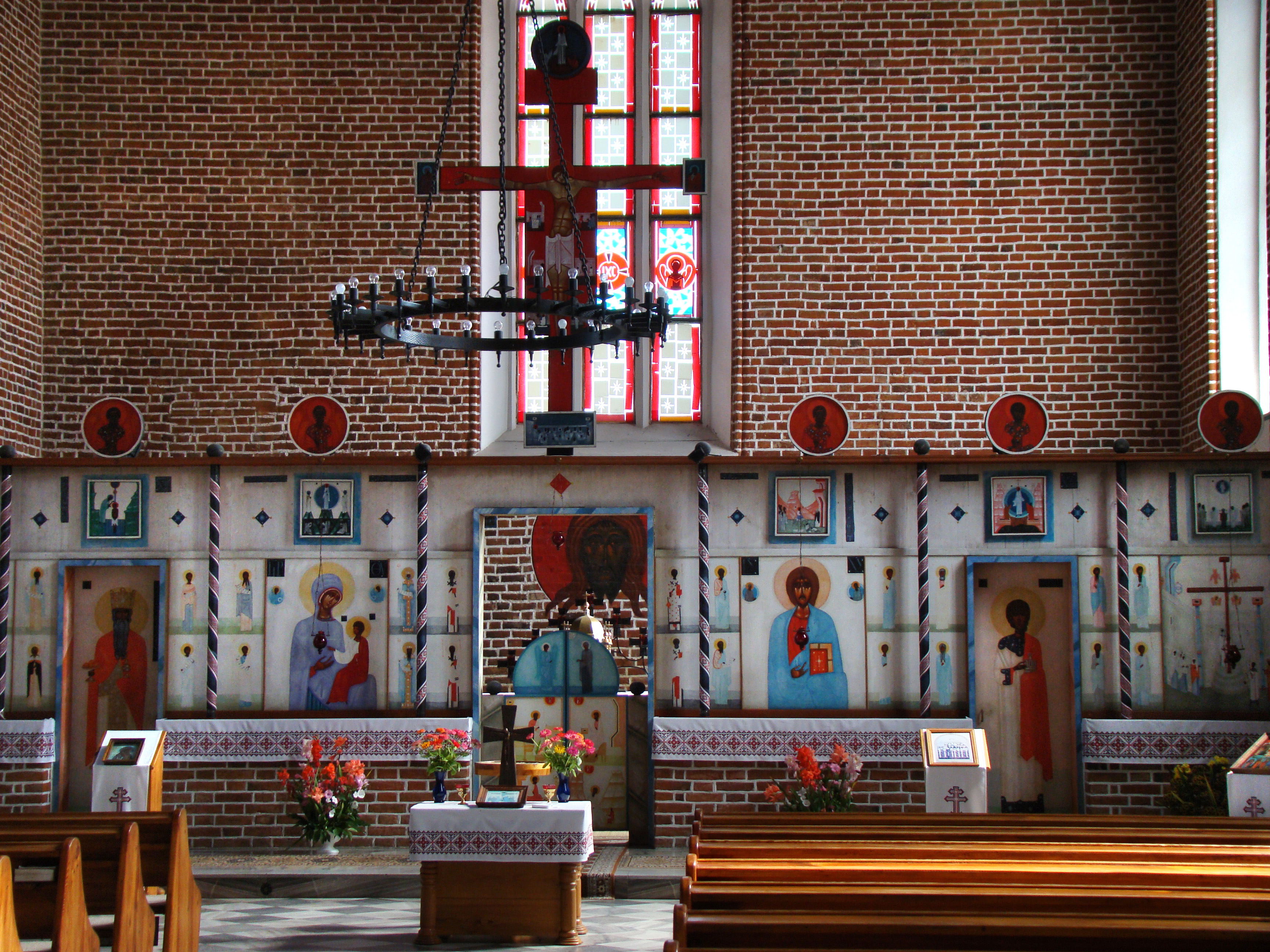 Górowo Iławeckie, ul. Warmińska 21 - dawny kościół ewangelicki, obecnie cerkiew greckokatolicka Podwyższenia Krzyża Świętego, ikonostas (zabytek nr A-215 i 257 (G/28) z 15.03.1957)